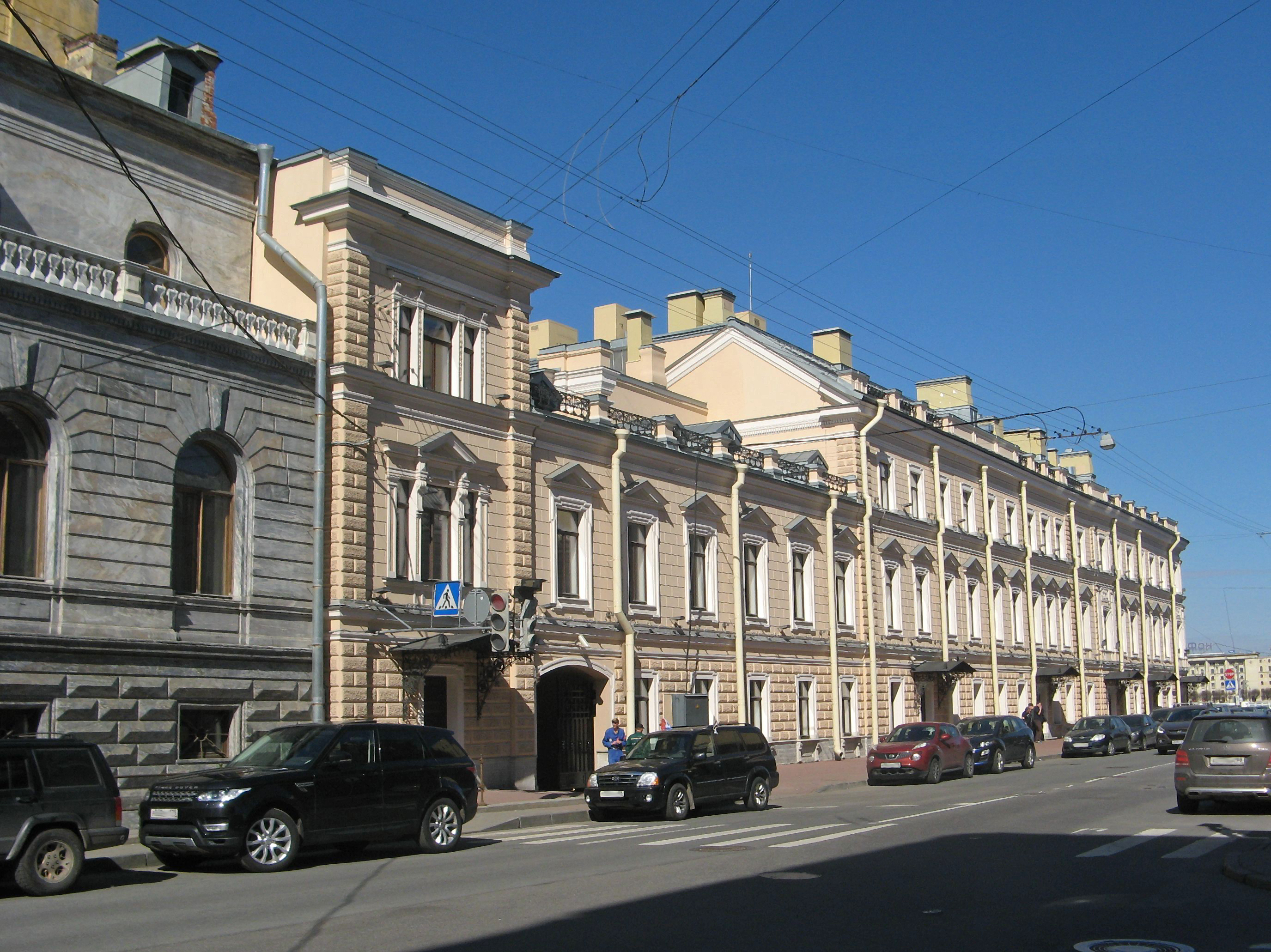 Особняк Г.А. Кушелева-Безбородко (А.Г. Елисеева) с дворовыми флигелями: Гагаринская улица, 1, набережная Кутузова, 24, Центральный район, Санкт-Петербург